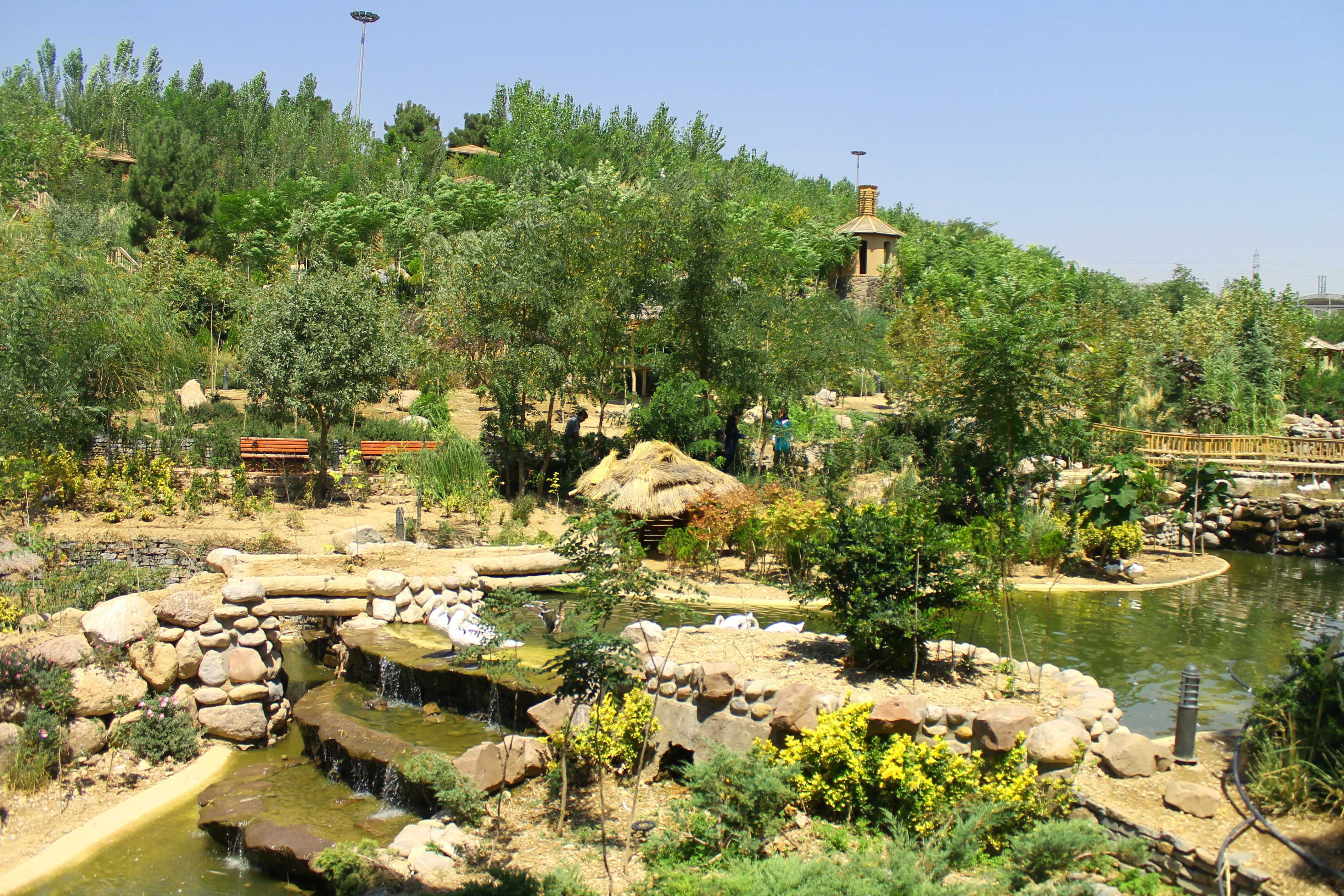 نمايي از باغ